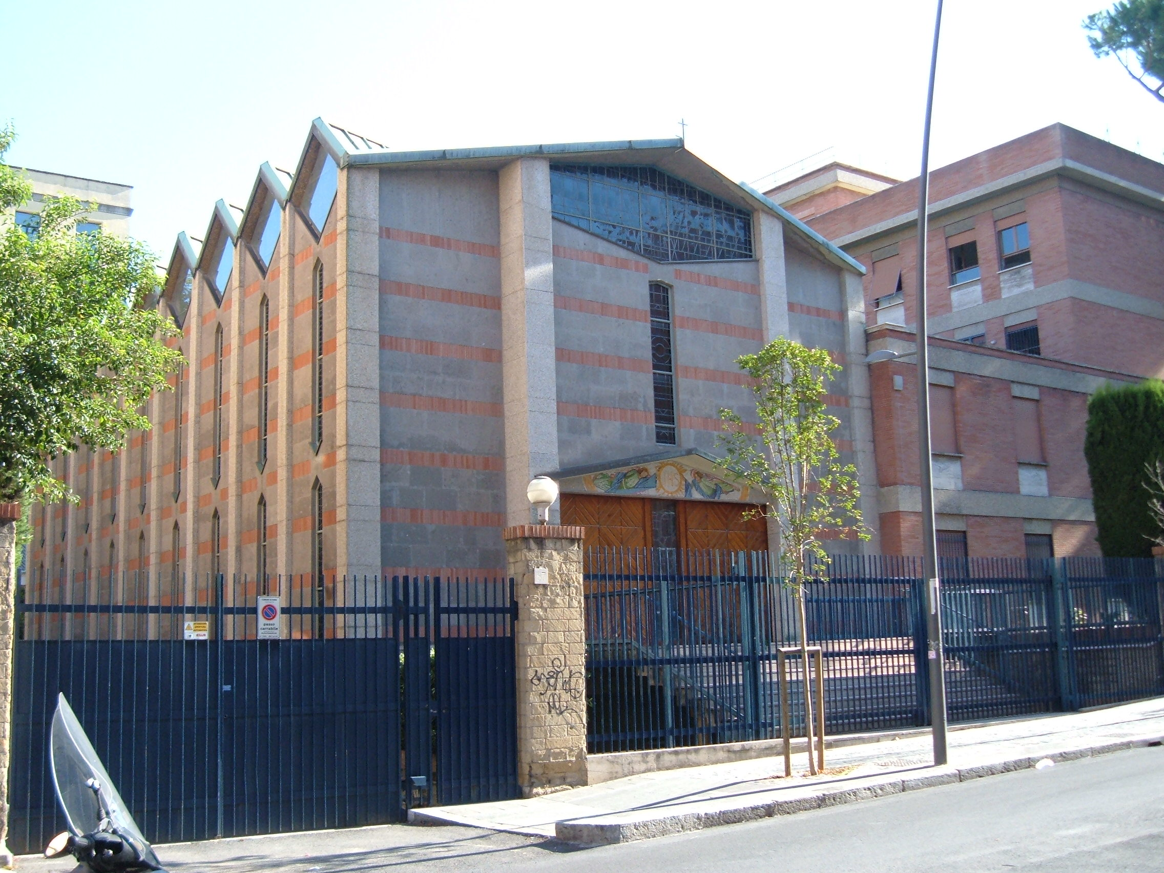 Cappella del Corpus Domini, a Roma, nel quartiere Ostiense, in via delle Sette Chiese. Chiesa annessa all'Istituto delle Suore Discepole di Gesù Eucaristico.